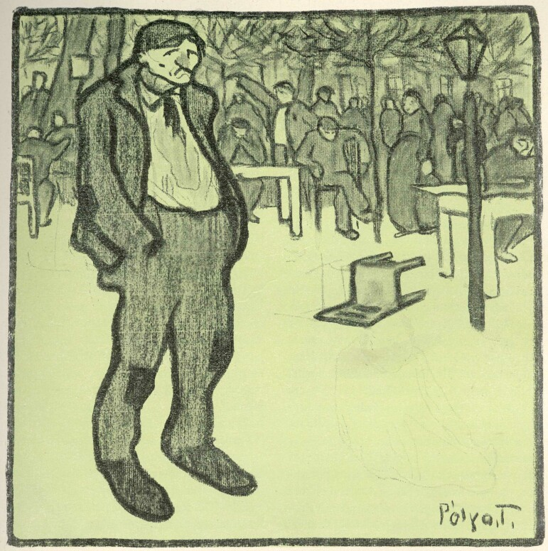 Strike (Sztrájk)